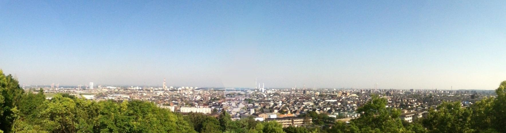 垂坂公園から撮った四日市港方面